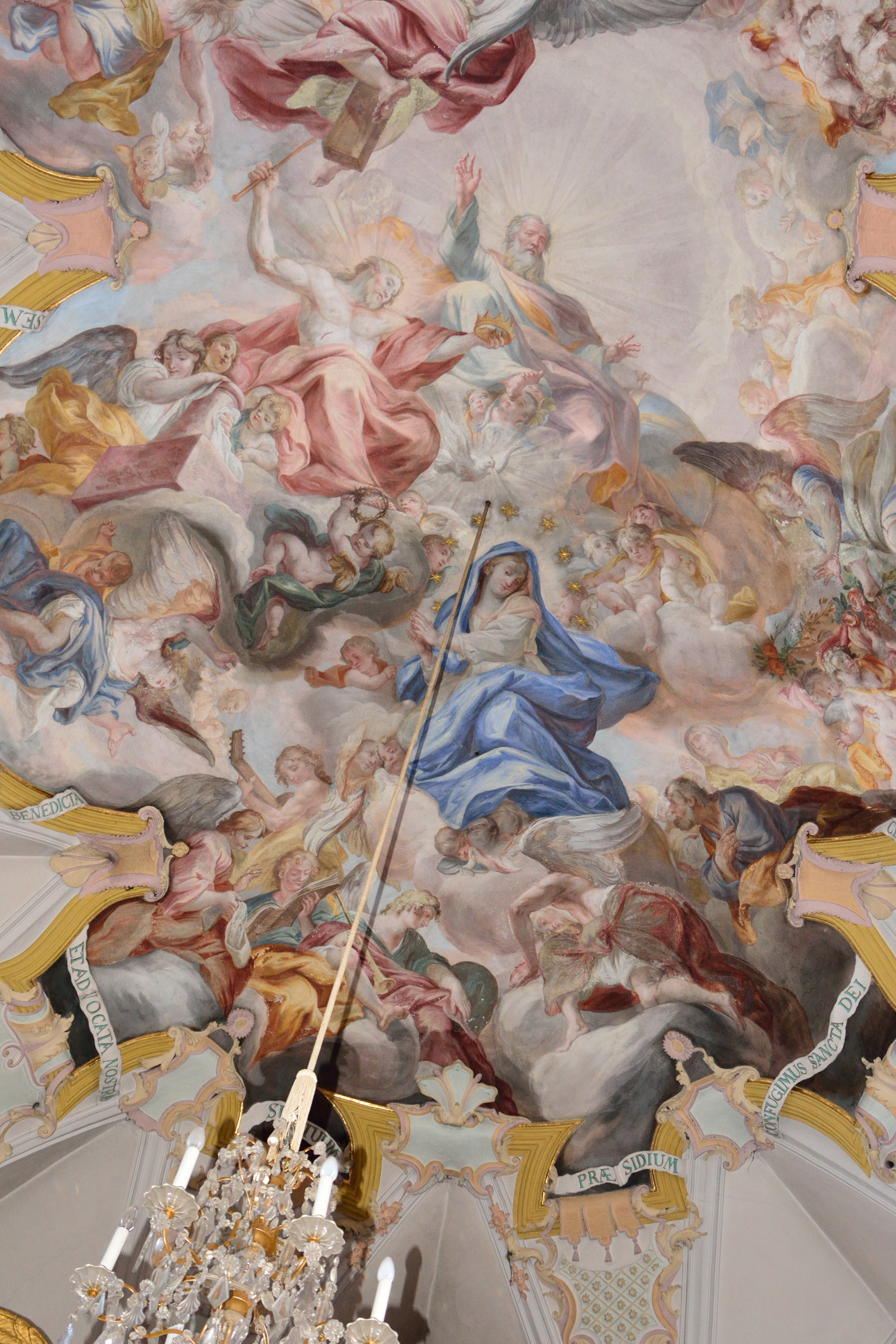 Deckenfresko in der Liebfrauenkirche in Kitzbühel von Simon Benedikt Faistenberger (1739): Aufnahme Mariens in den Himmel